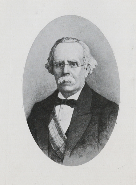 Antonio García Gutiérrez. Número de inventario: FD01107.